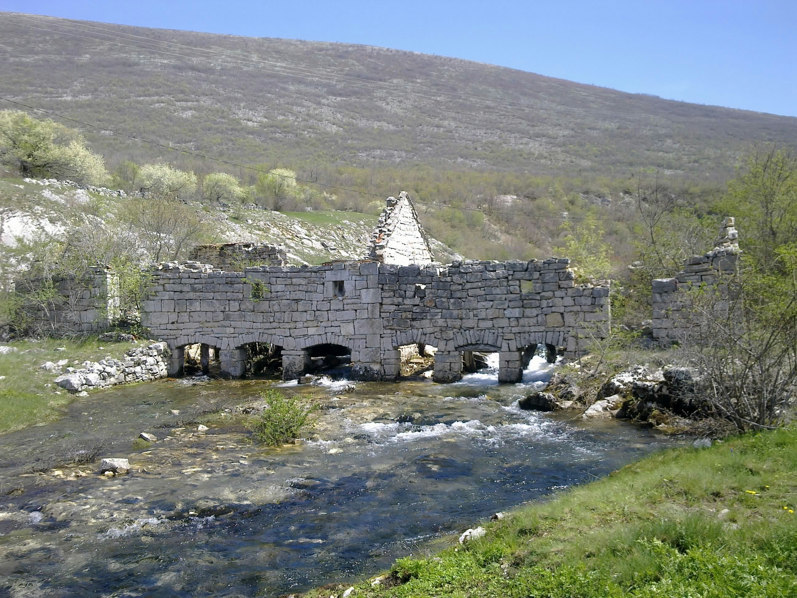 Басташки млини